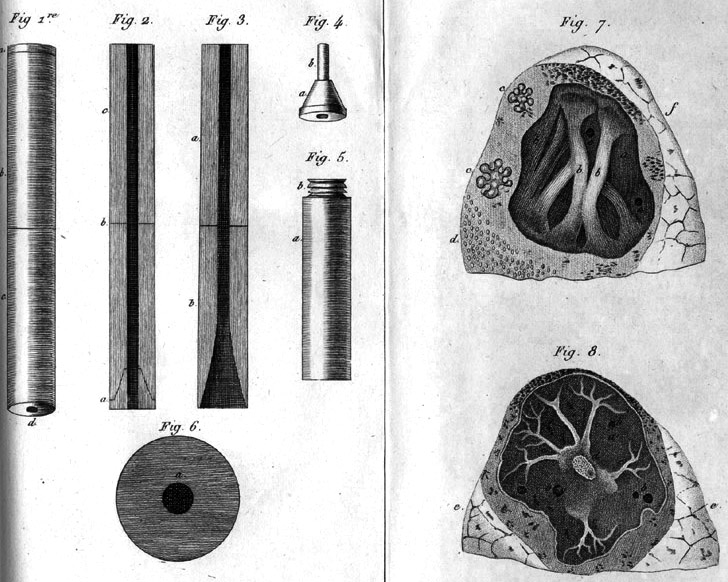 René Théophile Hyacinthe Laennec (1781-1825): De l’auscultation médiate, 1819.